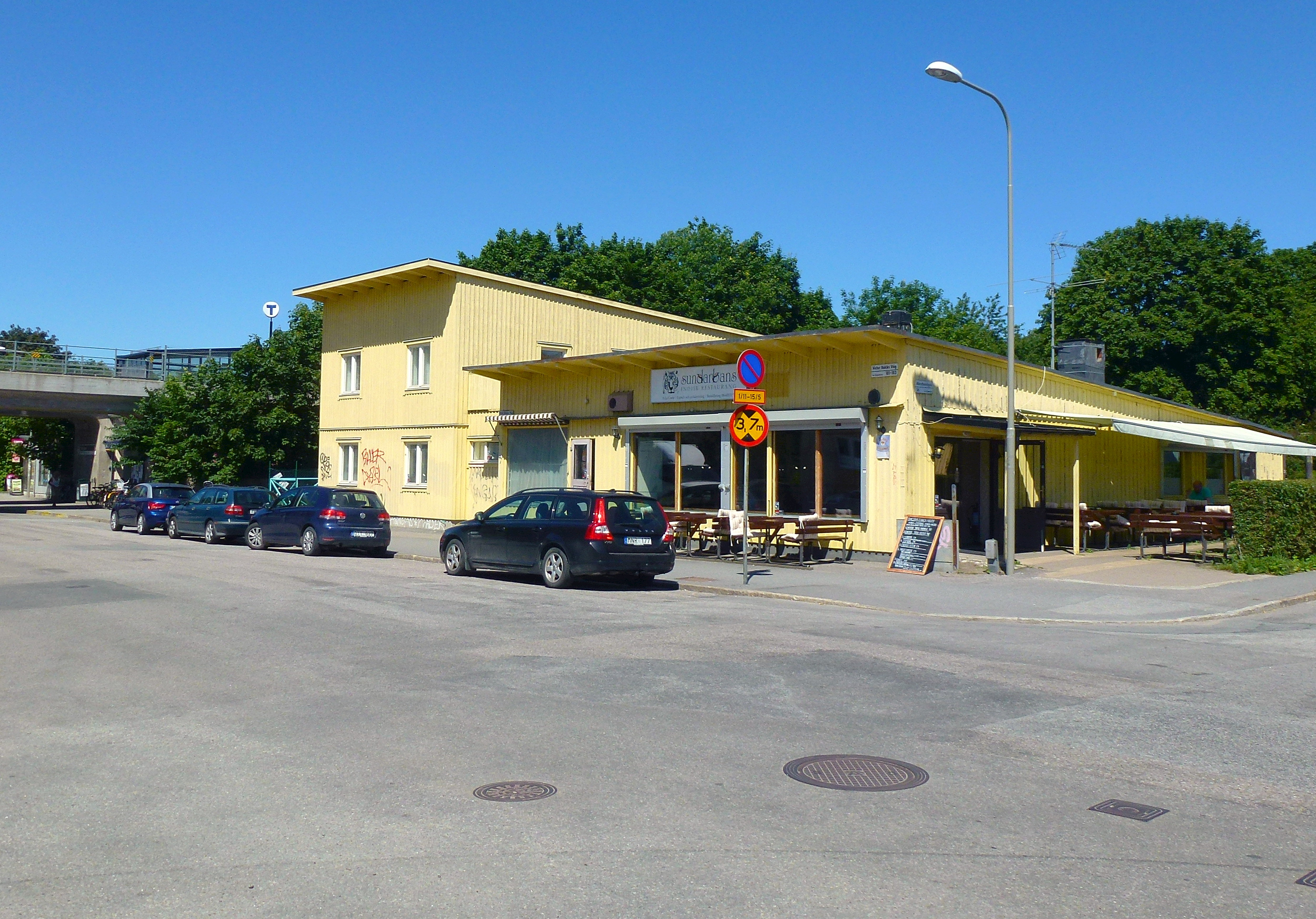 Fastighet Gymnasten 1, arkitekt Eskil Sundahl, byggd 1934, tillbyggd 1936. Butiker för kött, chark, mjölk, bröd.